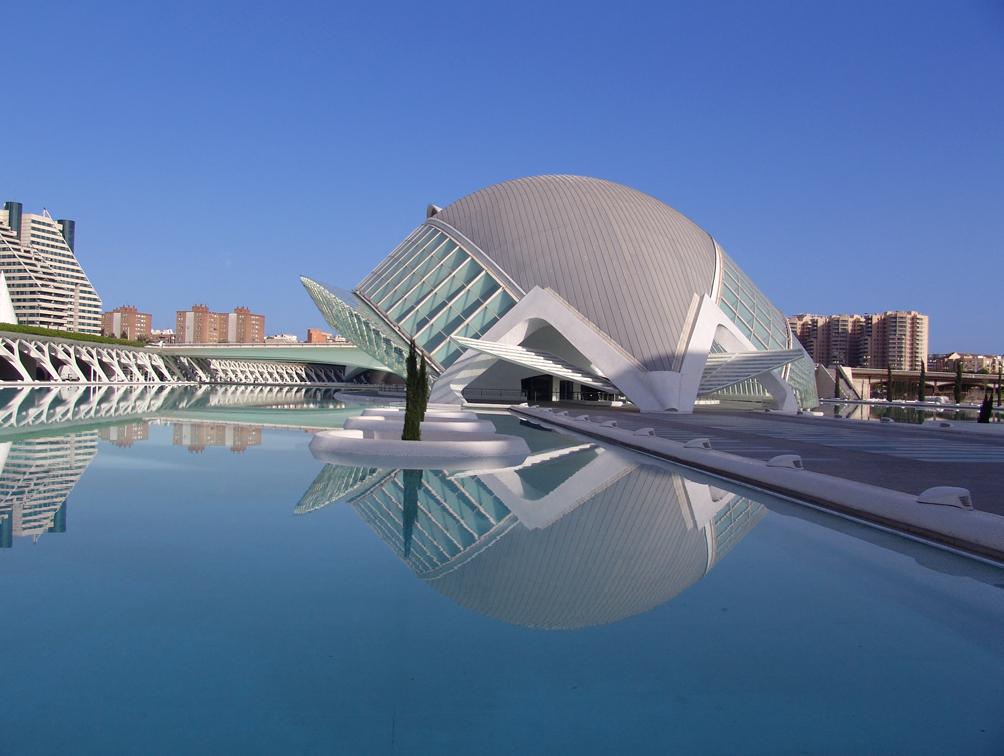 Hemispheric ValenciaHemisfèric - VALENCIA - 9'00 AM